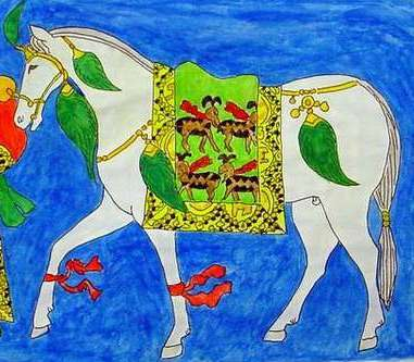 Freskórészlet Afrasziabból, Üzbegisztánból